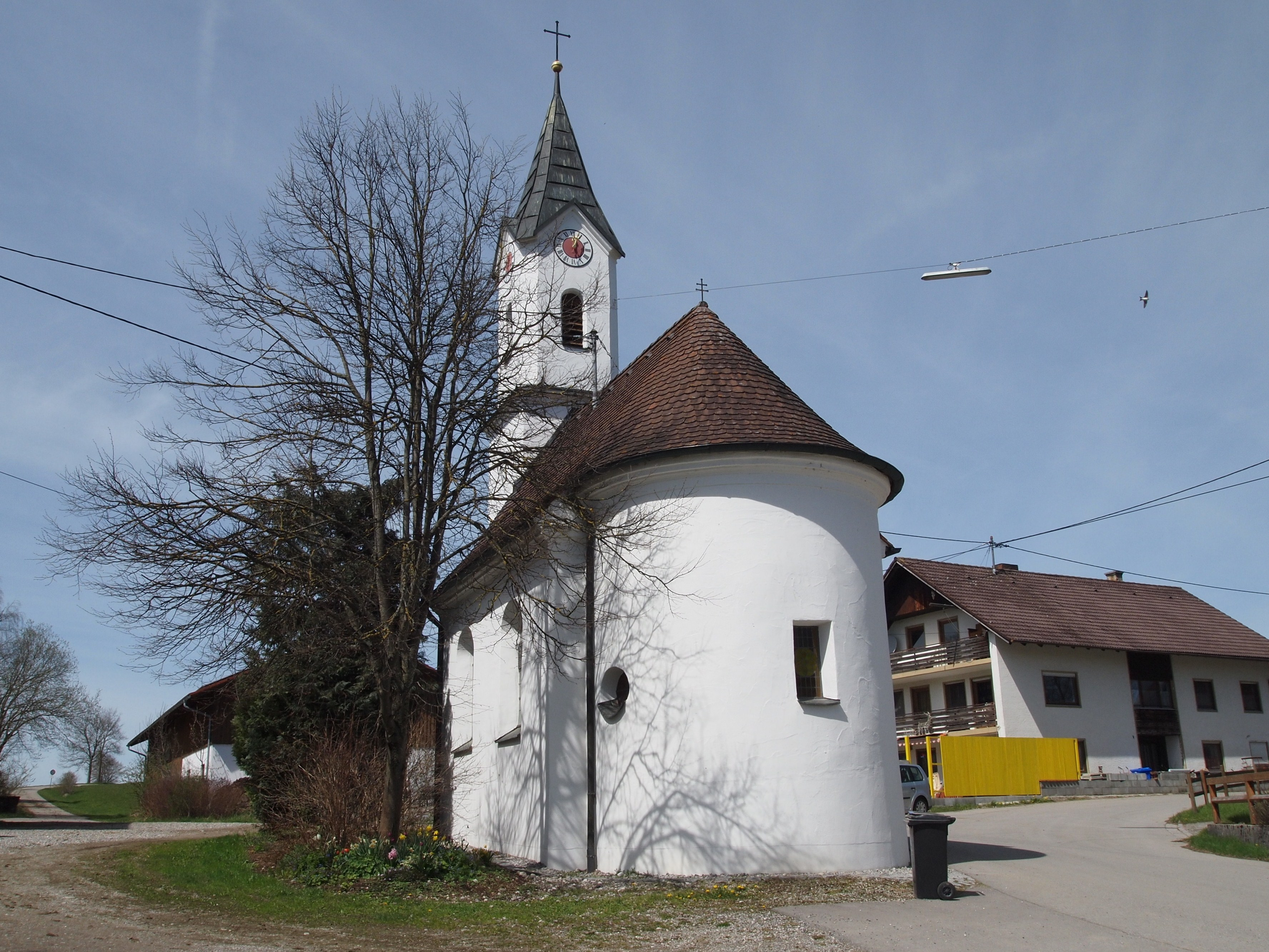 Geisenhofen, Marienkapelle